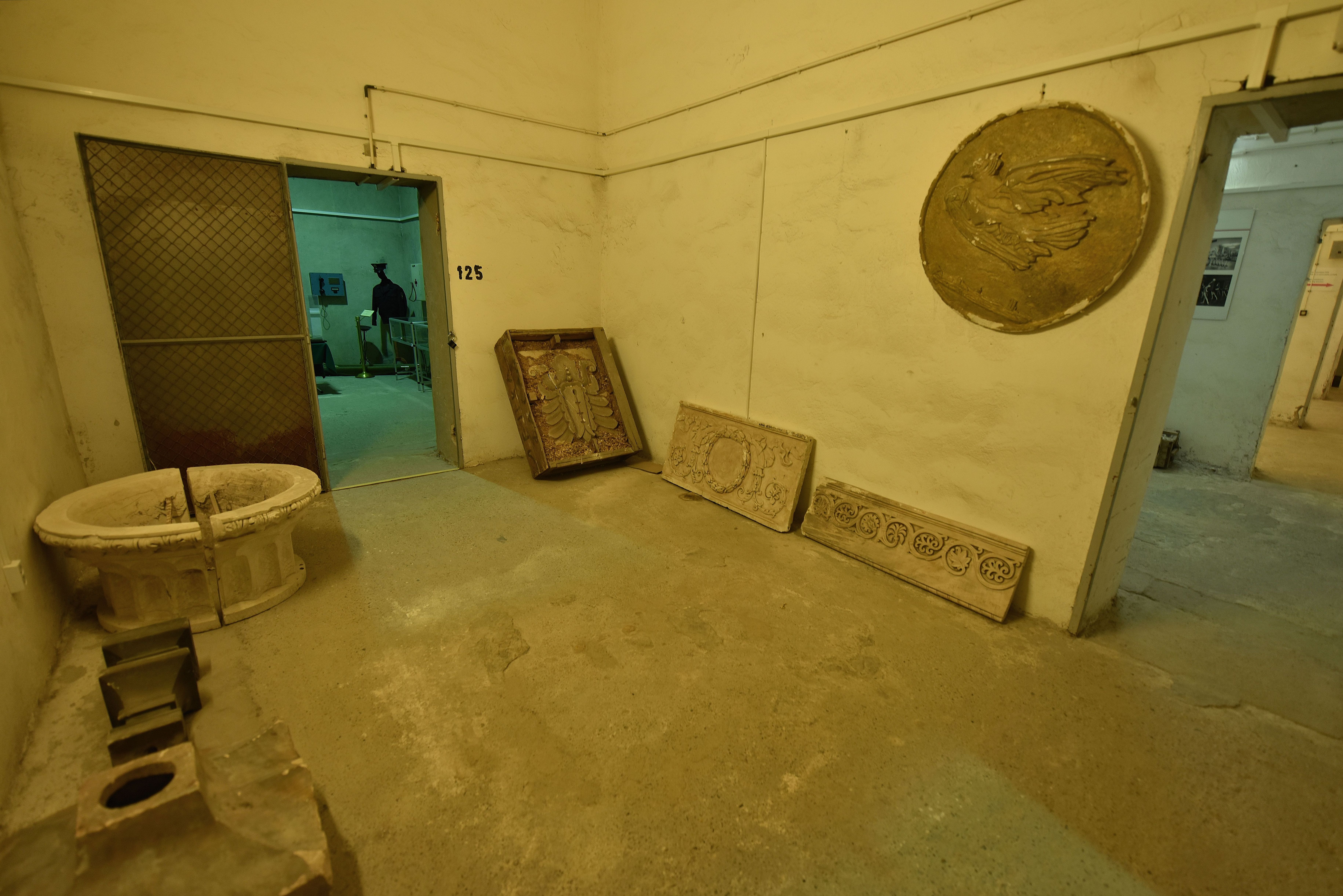 Fragment wystawy o historii Pałacu Kultury i Nauki na poziomie -2